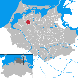 Lüdershagen in Mecklenburg-Vorpommern - District Nordvorpommern